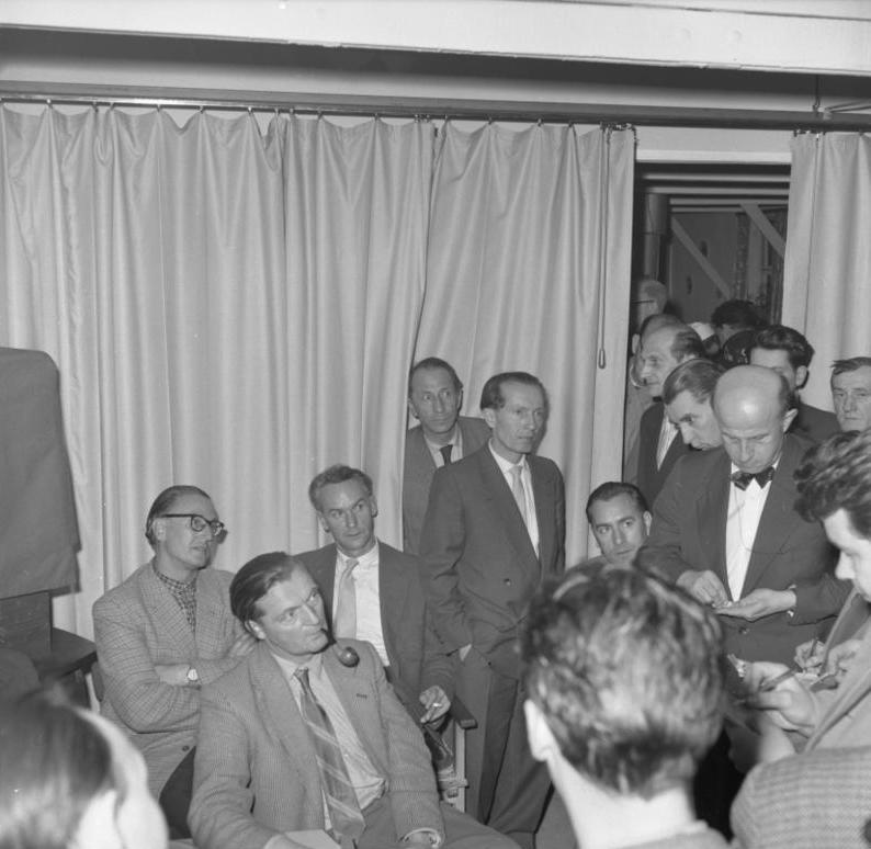 Lager Friedland Ankunft der Wissenschaftler aus Sochumi 12. Februar - 16. Februar 1958